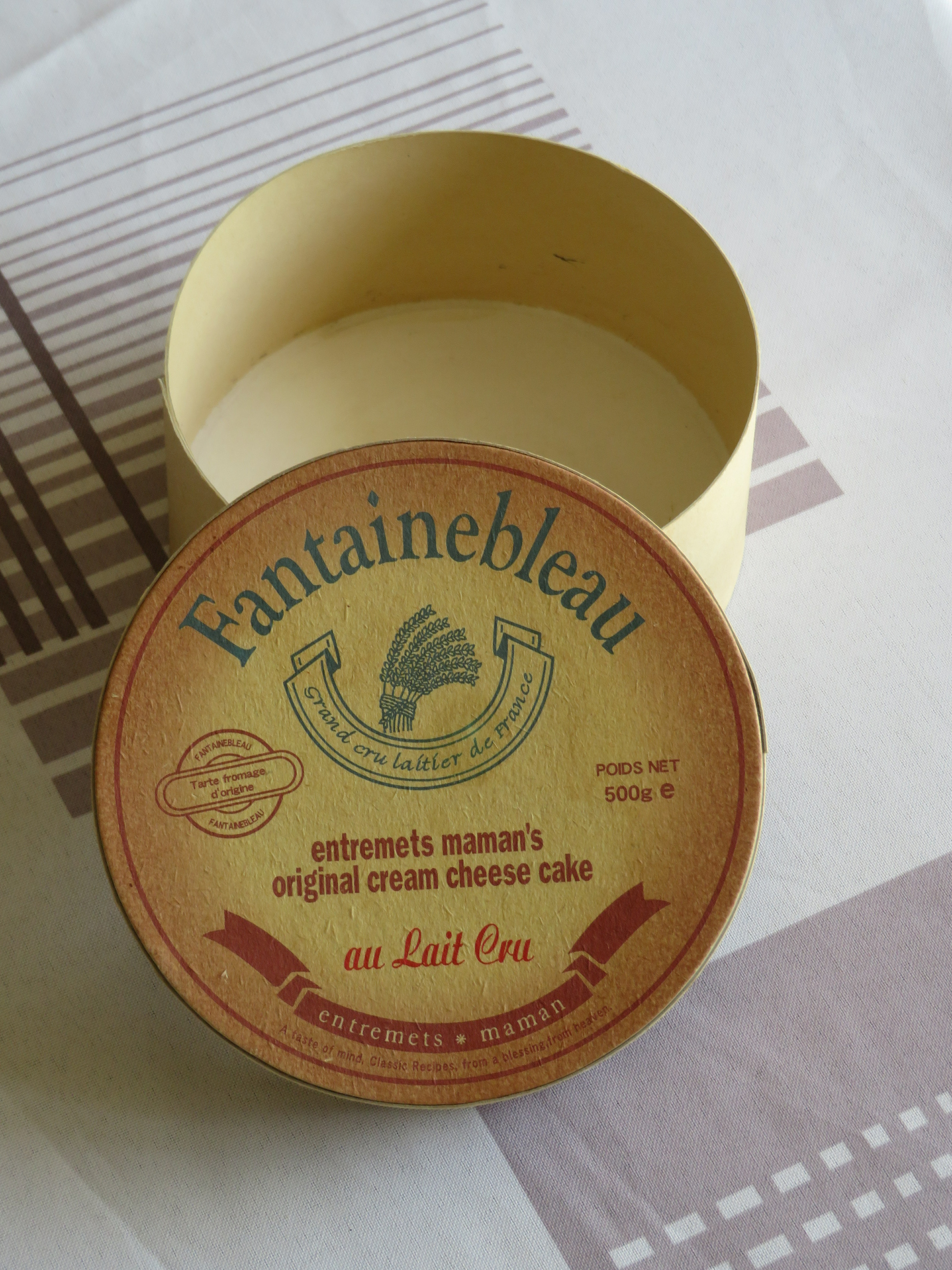 Exemple de franponais sur une spécialité patissière japonaise (gâteau au fromage soufflé).